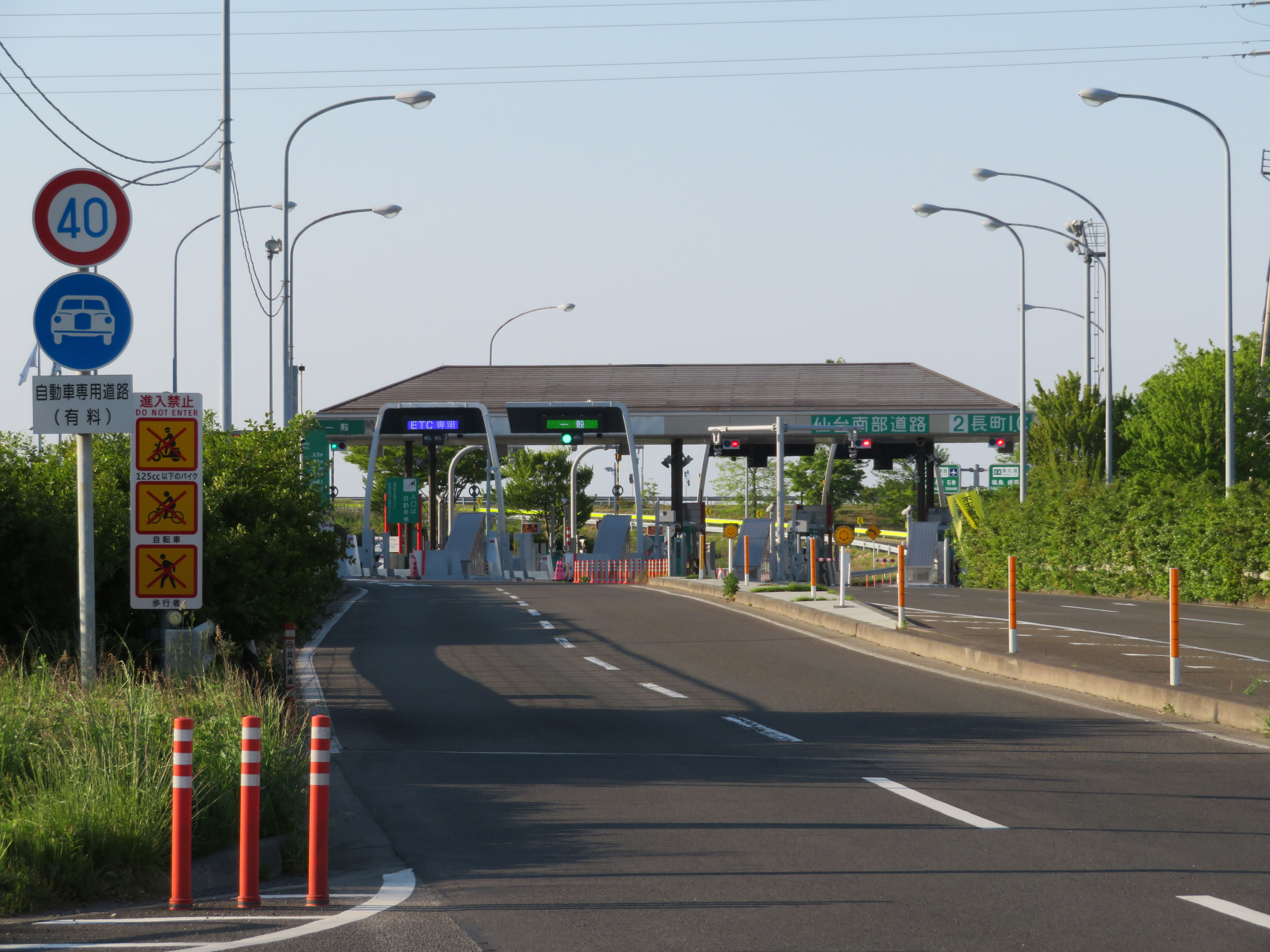 仙台南部道路 長町インターチェンジ料金所（入口付近から撮影） Canon PowerShot SX720 HS